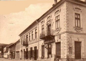 Abrud, ilustraţie de la începutul sec.XX